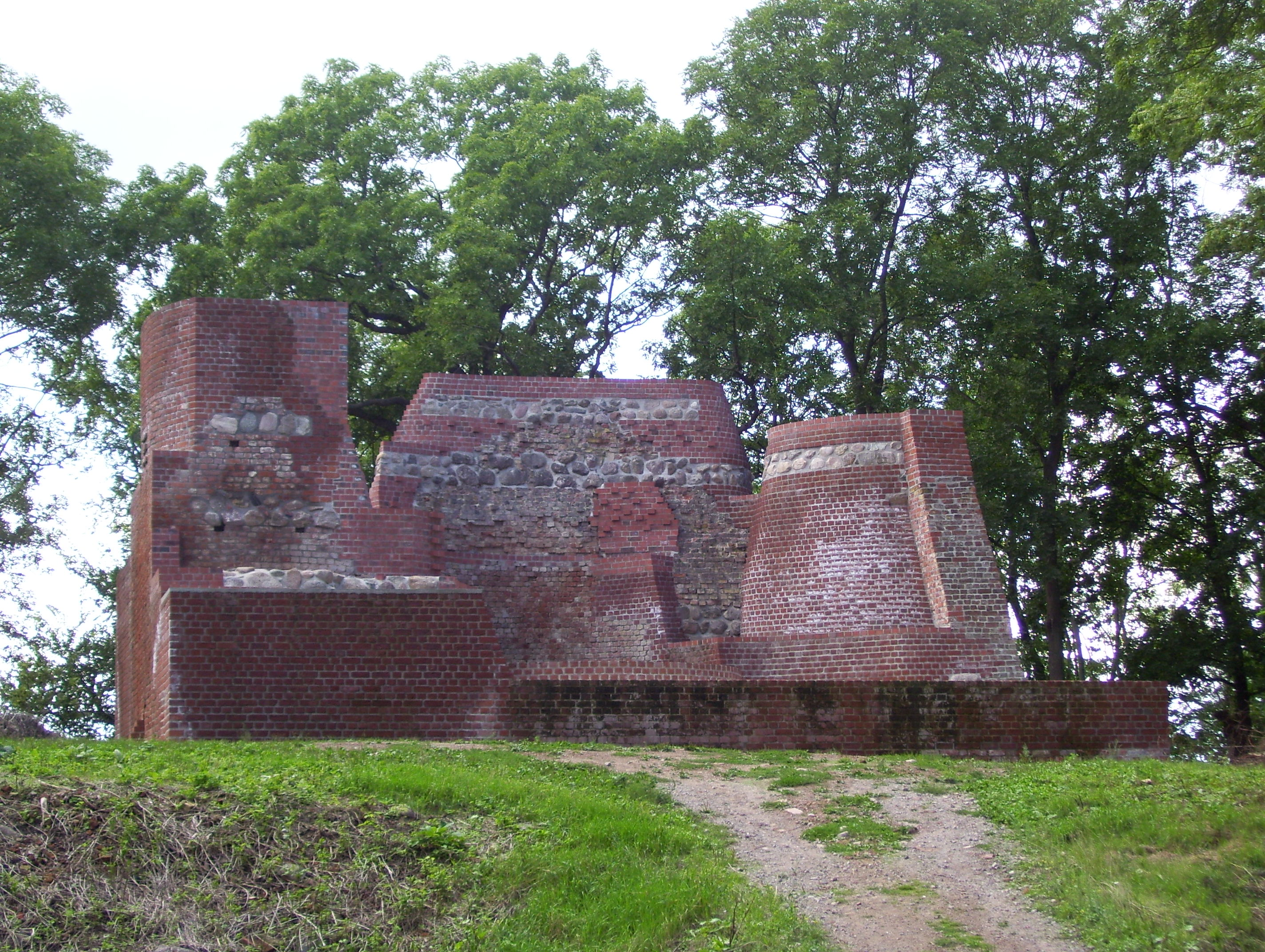 Burgruine Haus Demmin 2010, nach der Sanierung, Ansicht von Osten